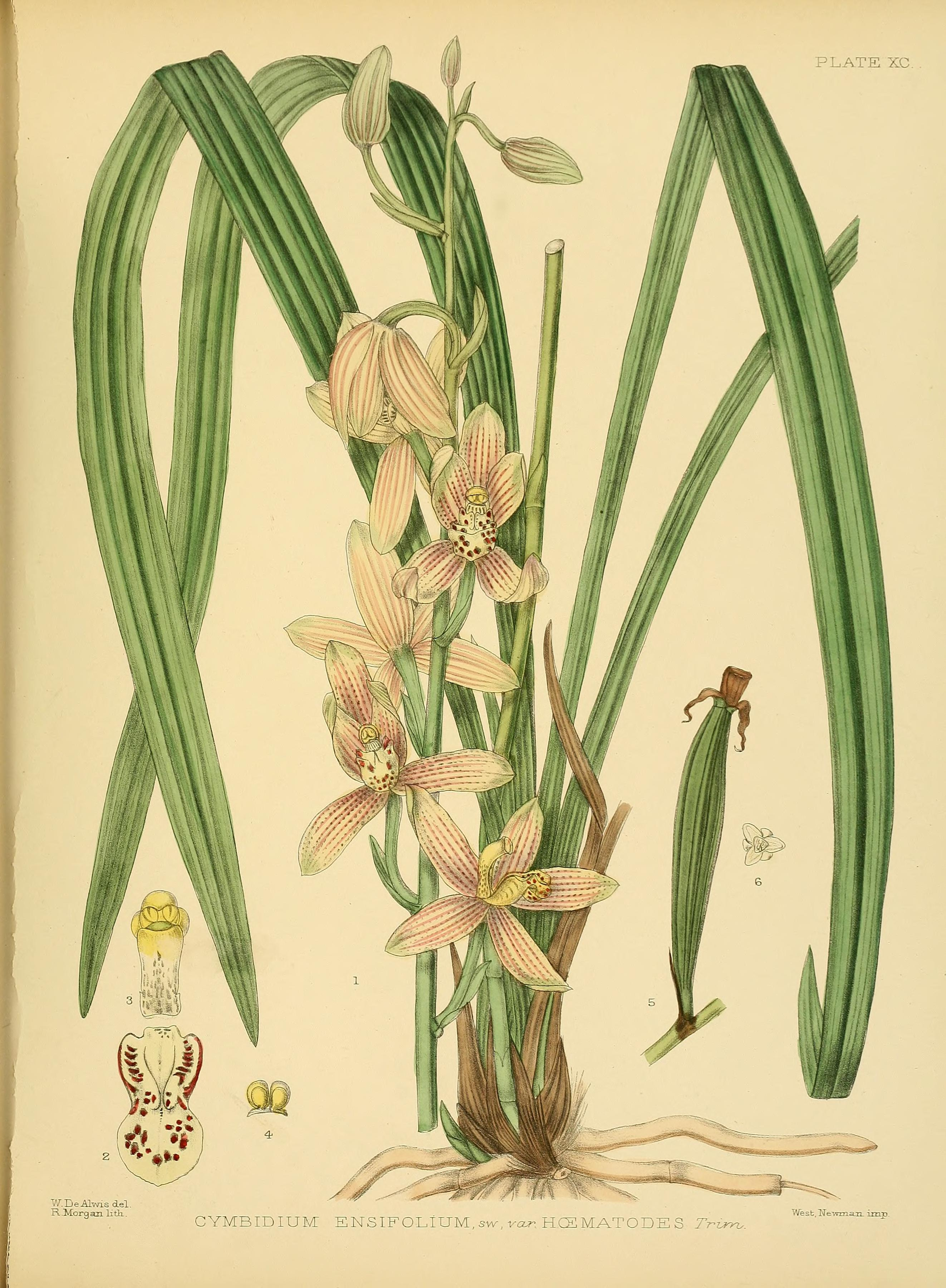 PLATE XC. W.DeALwis del R Morgan litli. CYMBIDIUM ENSIFOLiUM,sw,varHCSMATODES Trzrro. West. Newman imp